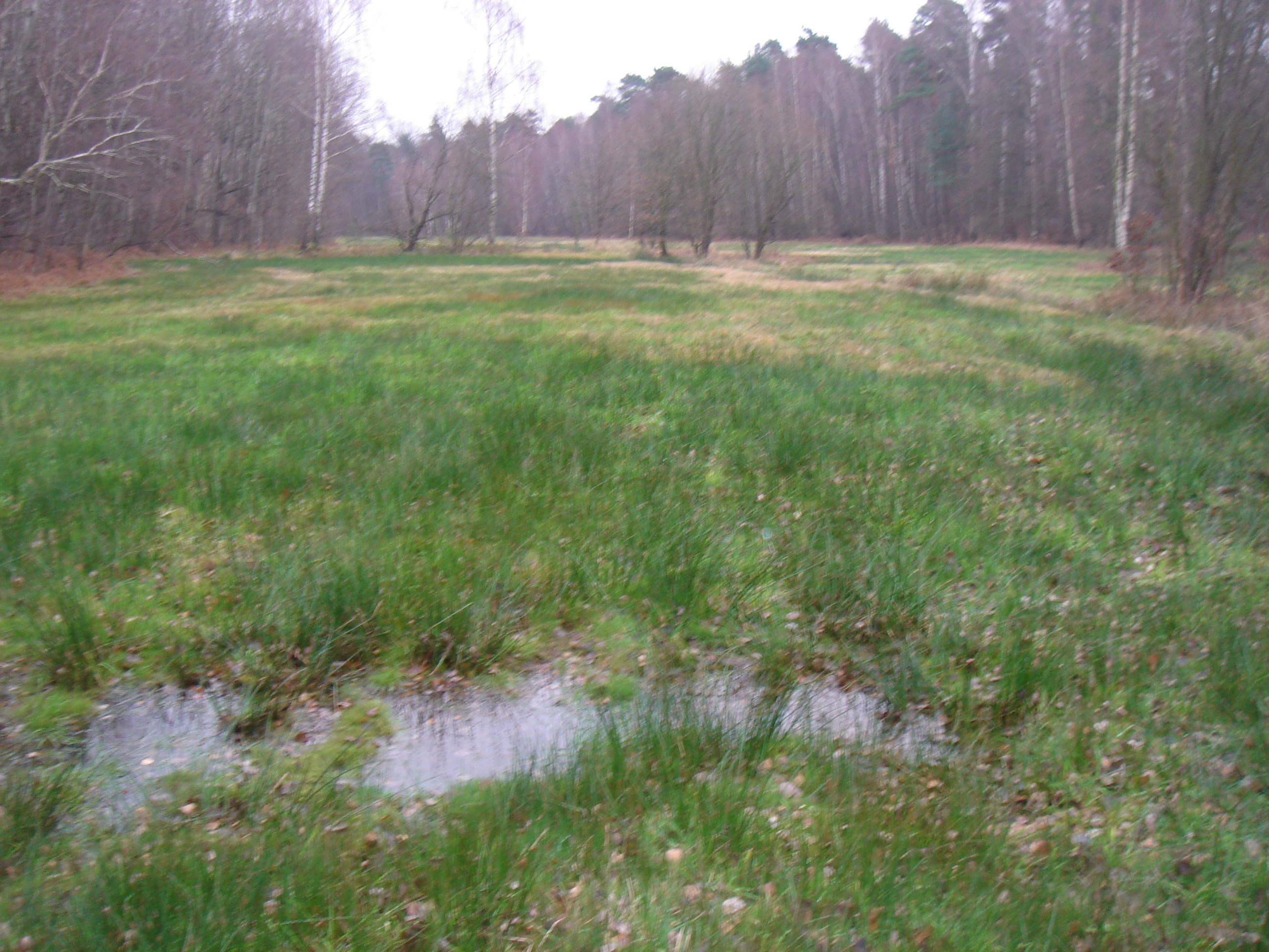 Feuchte Kurwiese bei Klotzsche (Naturdenkmal 47), Dresdner Heide